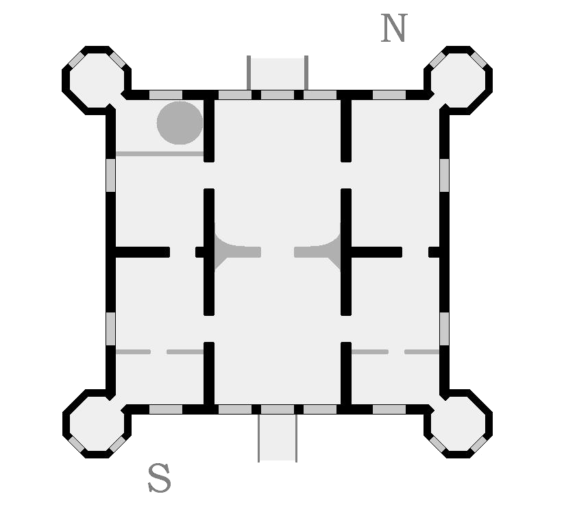 schematischer Grundriss des Ahrensbuer Schlosses zur Reniassancezeit. Spätere Umbauten (entferte Wendeltreppe, durch Schimmelmann eingezogene Wände) hellgrau markiert